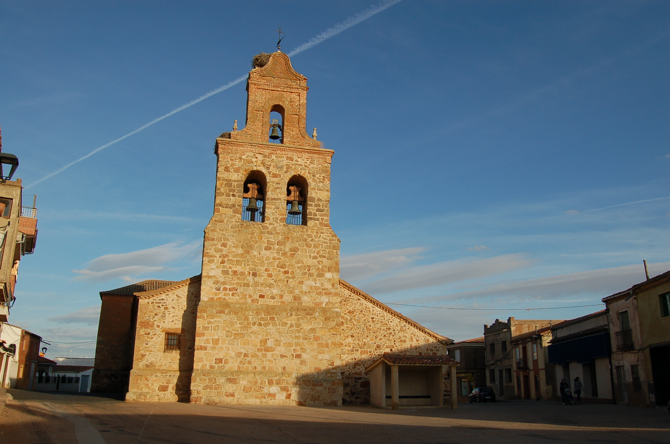 Igrexa de Manganeses de la Lampreana